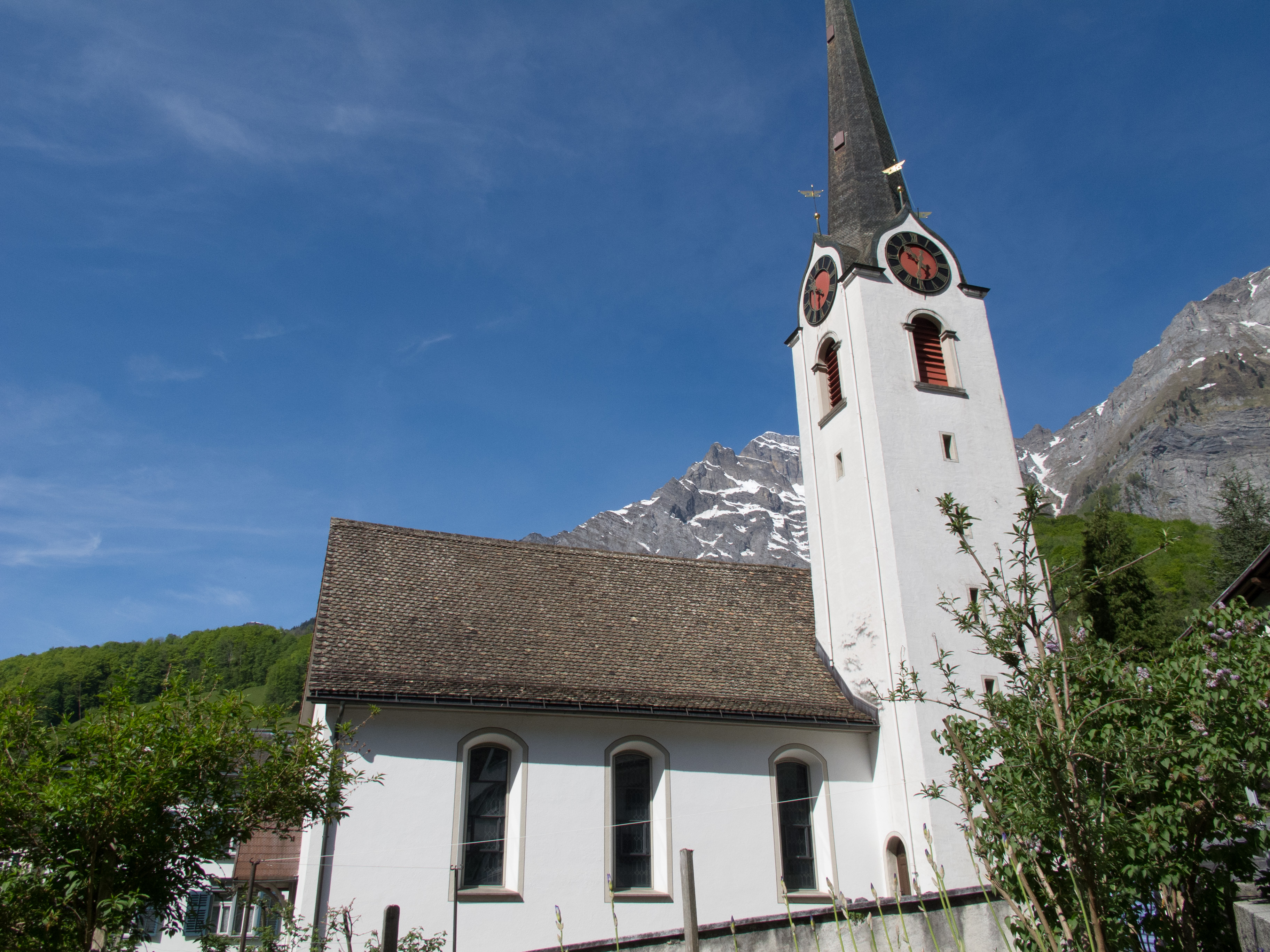 Reformierte Kirche Mitlödi